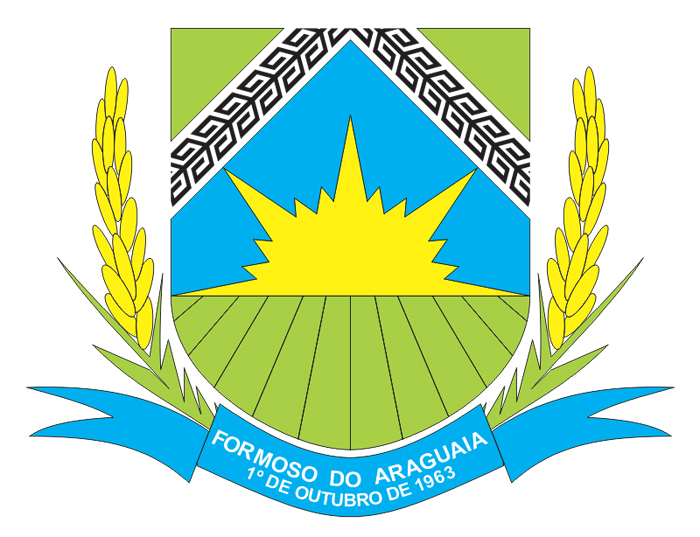 Brasão de Armas do município de Formoso do Araguaia, Tocantins, Brasil.